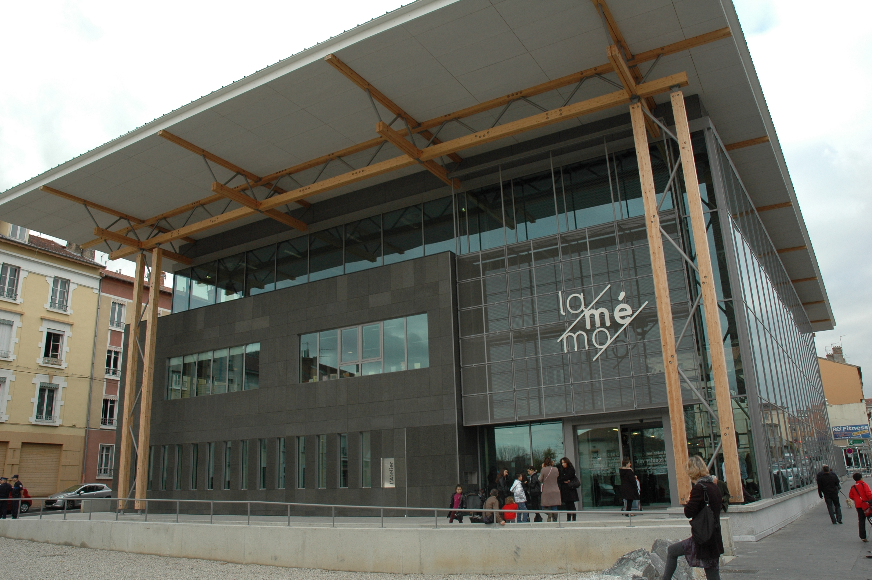 Façade de la médiathèque d'Oullins